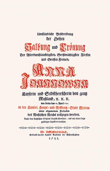 Титульный лист факсимиле цветного издания коронационного альбома